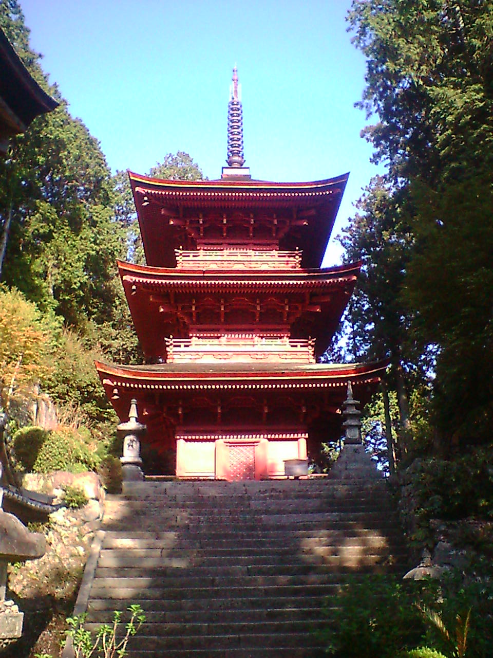 姨綺耶山長命寺